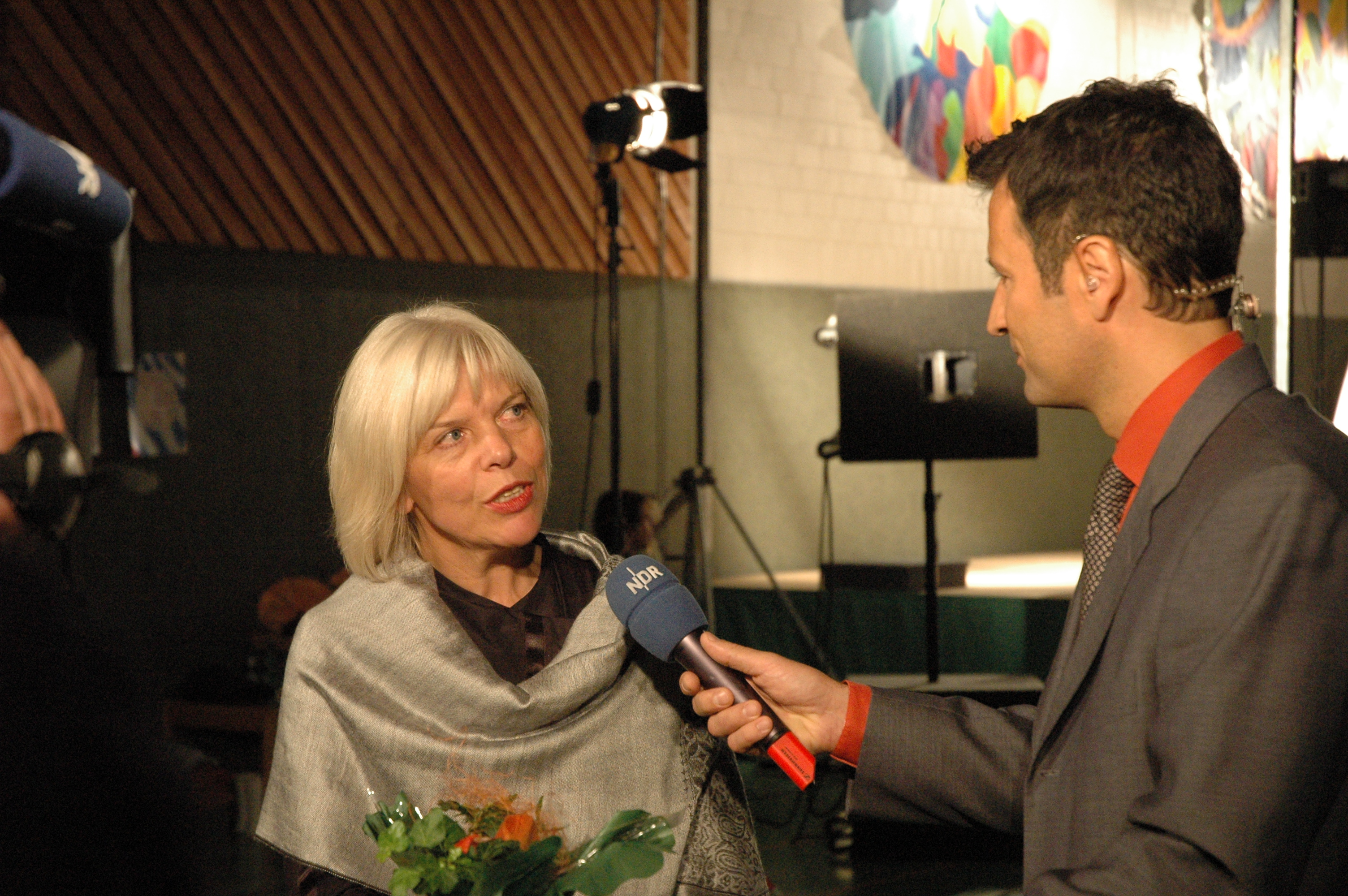 NDR 1Welle Nord Chefin Elke Haferburg gibt SH-Magazin Moderator Gerrit Derkowski ein Interview. "Durch die Popularität von 'Hör mal 'n beten to' sind aus vielen Radiohörern zugleich Leser plattdeutscher Literatur geworden. Der NDR trägt damit ganz wesentlich zum Erhalt der niederdeutschen Sprache bei. Über die Auszeichnung der Stadt Kappeln zum 50. Geburtstag der Sendereihe freuen wir uns ganz besonders."